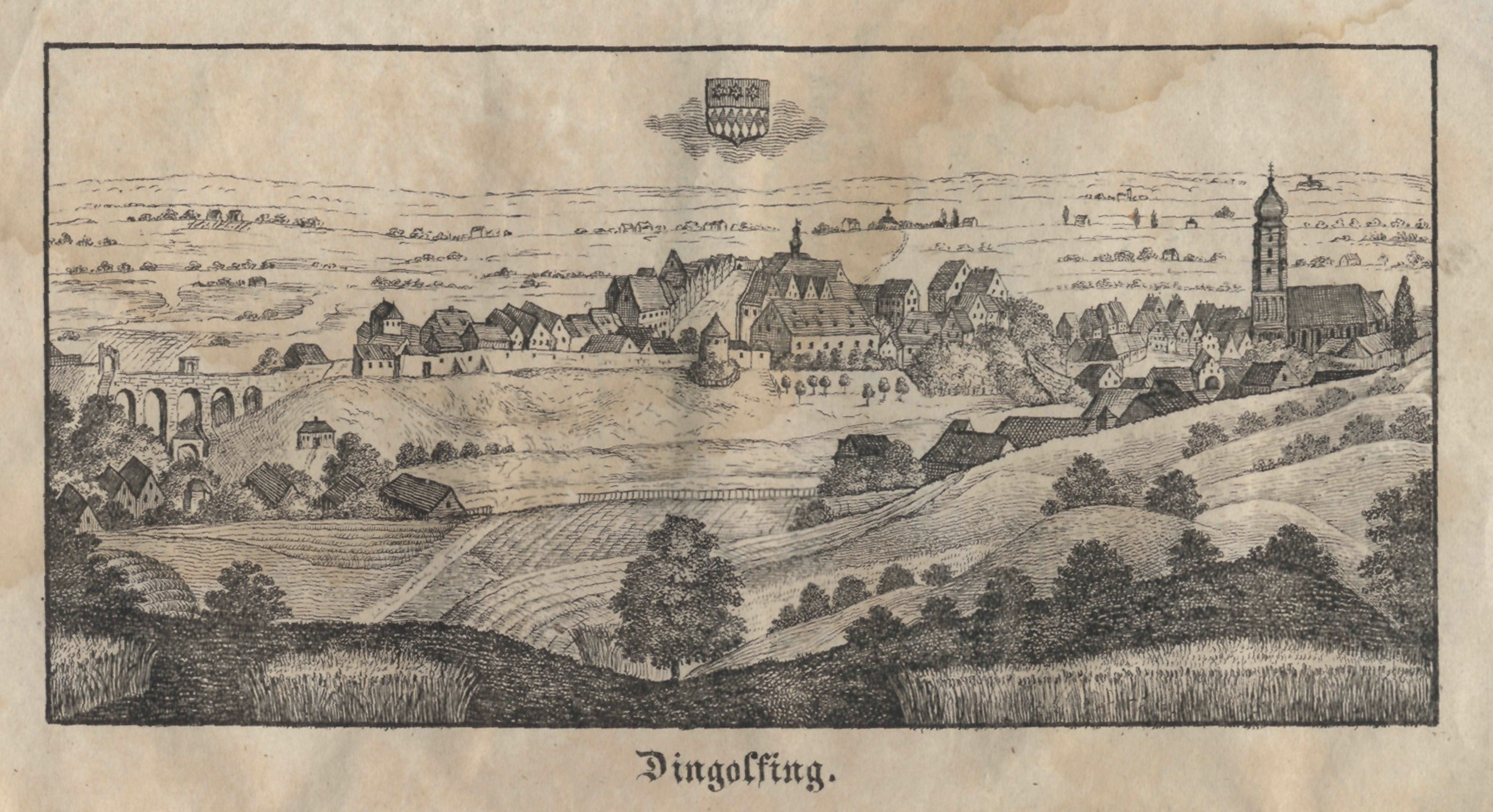 Ansicht der Stadt Dingolfing. Kupferstich vermutlich von Josef Wolfgang Eberl